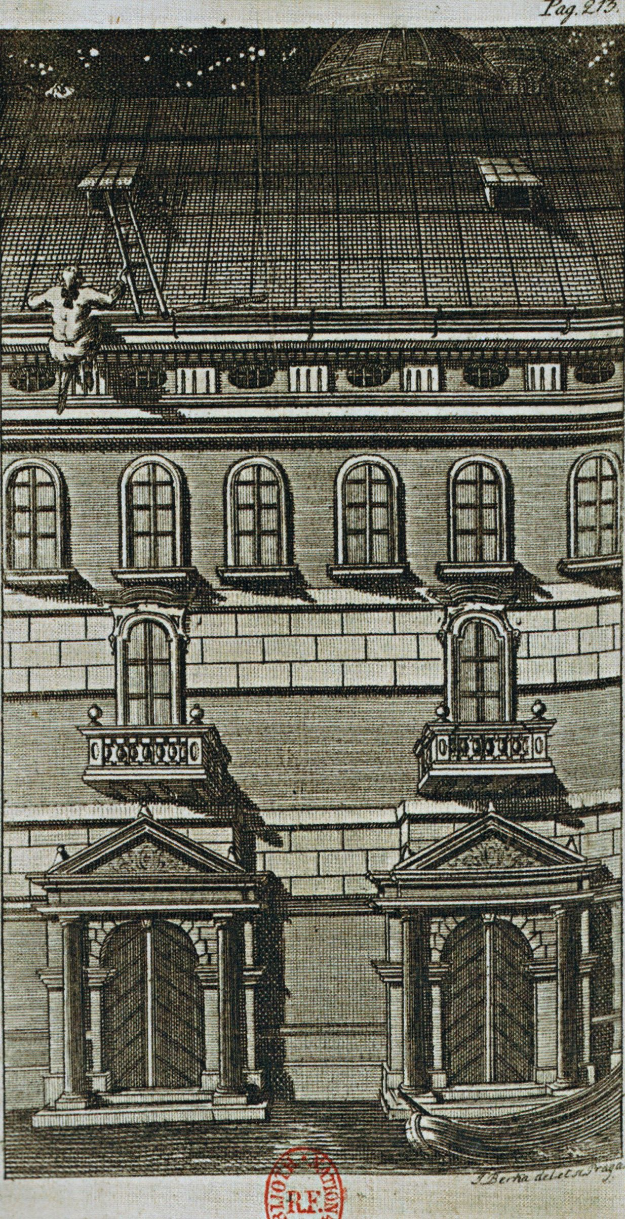 Evasion de Giacomo Casanova de la prison des Plombs. Extrait de "Histoire de ma fuite des prisons de Venise" édition de 1788.